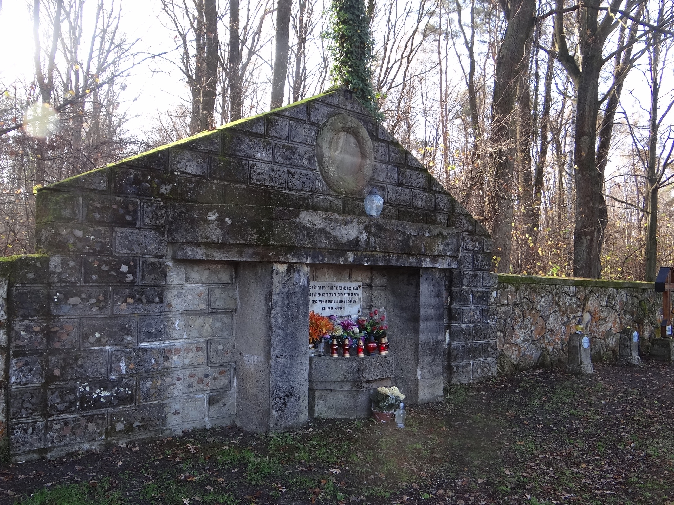 Cmentarz wojenny nr 271 w Biadolinach